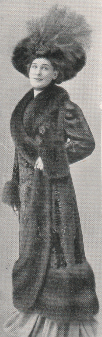 Abb. Nr. 11: Tristan. Vornehmer, wenig geschweift. Paletot mit ganz breitem Pelzbesatz, 135 cm lang, I A Breitschwanz m. Skunks, M. 4500; Electric Seal mit Skunksseefuchs, M. 330,-; Electric Seal mit Skunksopossum, M 525,-; Electric-Bisam mit Skunks, M. 1750; Persianer mit Skunks, 1750,-.